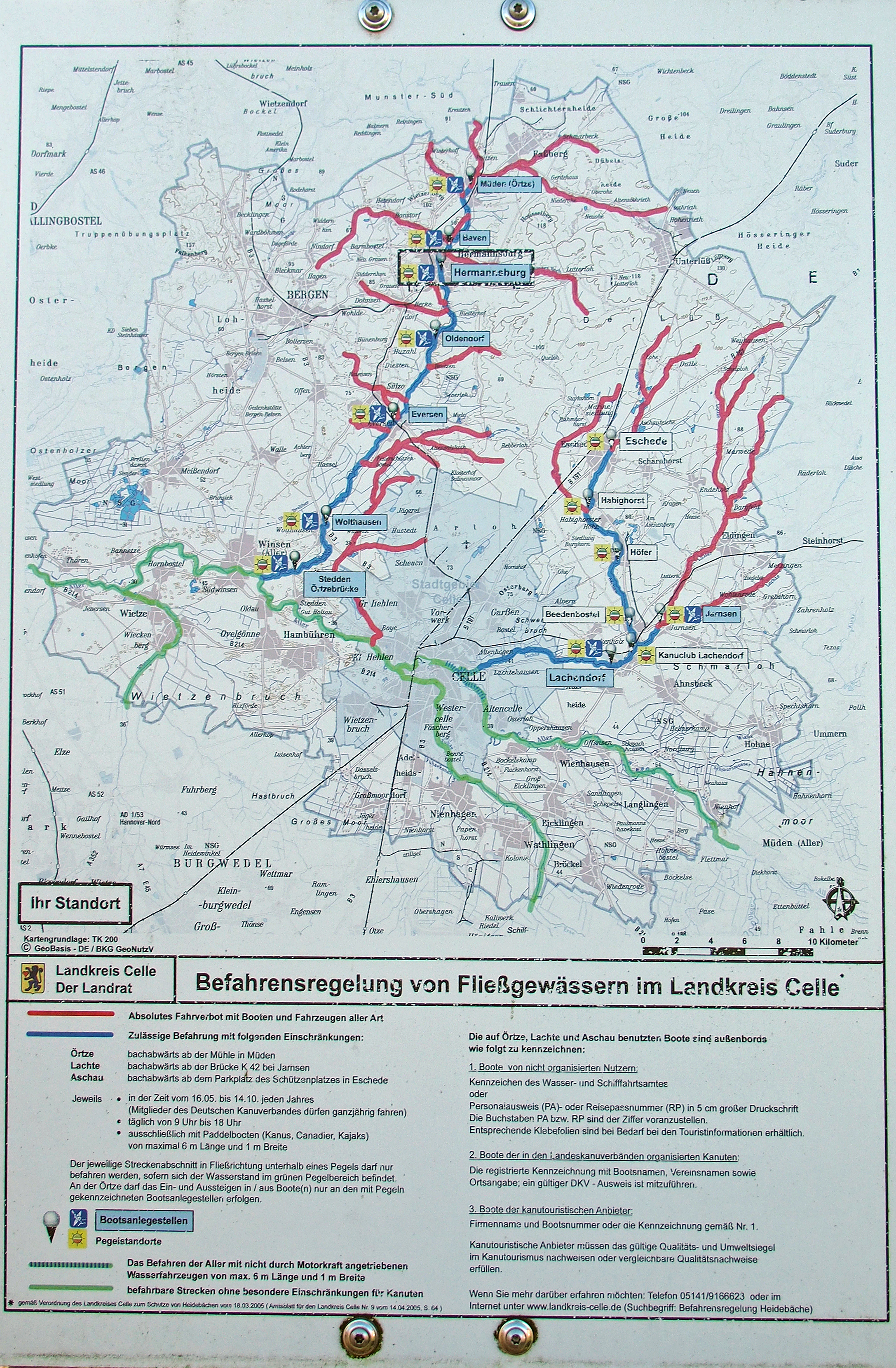 Befahrensregelung von Fließgewässern im Landkreis Celle - Örtze, Lachte, Aschau - Foto der öffentlichen Infotafel